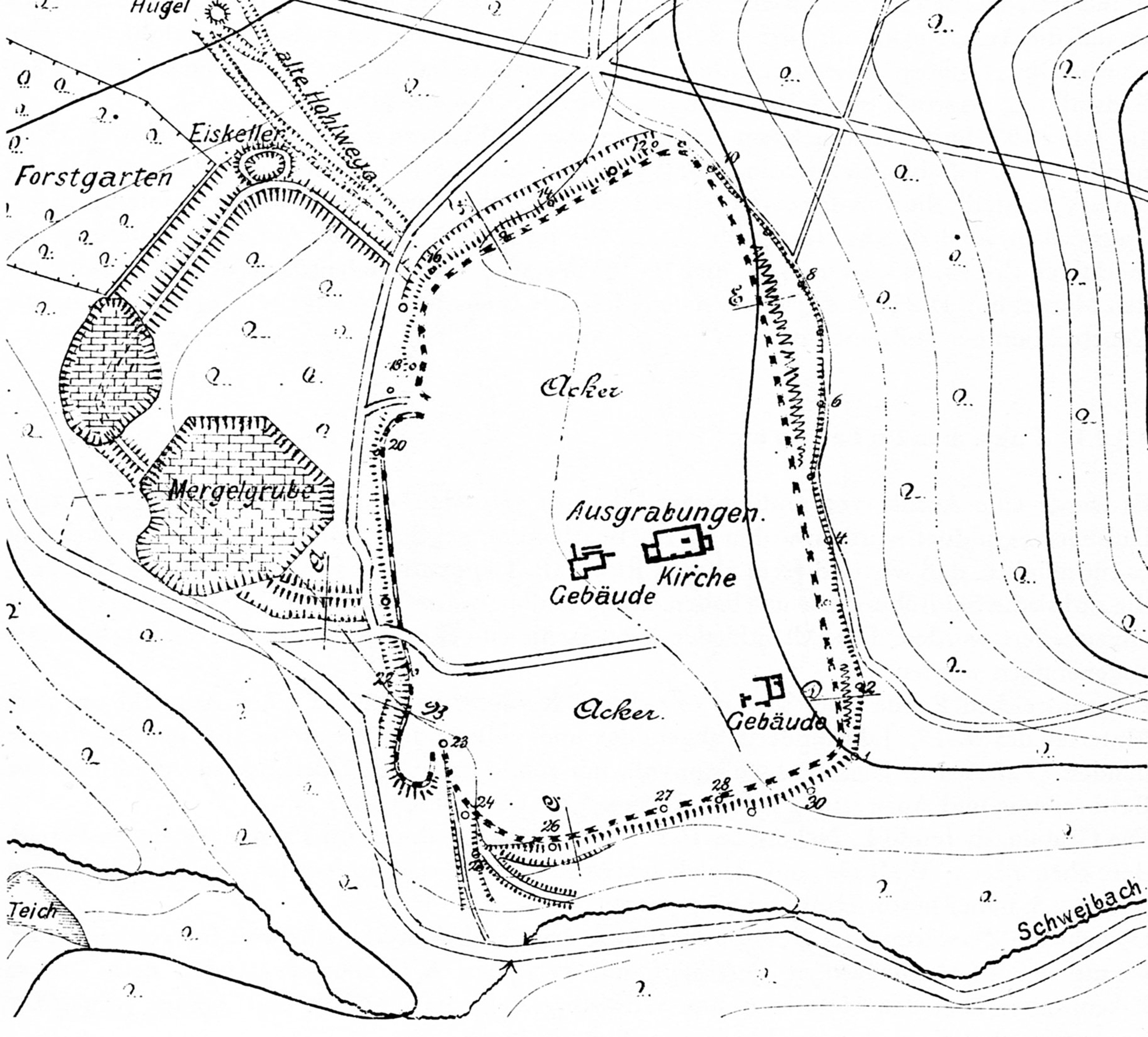 Alt-Schieder, Lageplan von 1916 (nach Carl Schuchhardt 1859-1943). In der Mitte die Hauptburg, oben links die Vorburg.